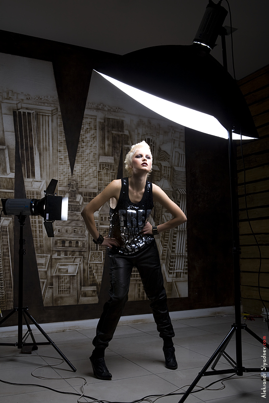 Использование студийного света в интерьерной фотосъемке. Используется два источника, один с софтбоксом, другой со шторками.